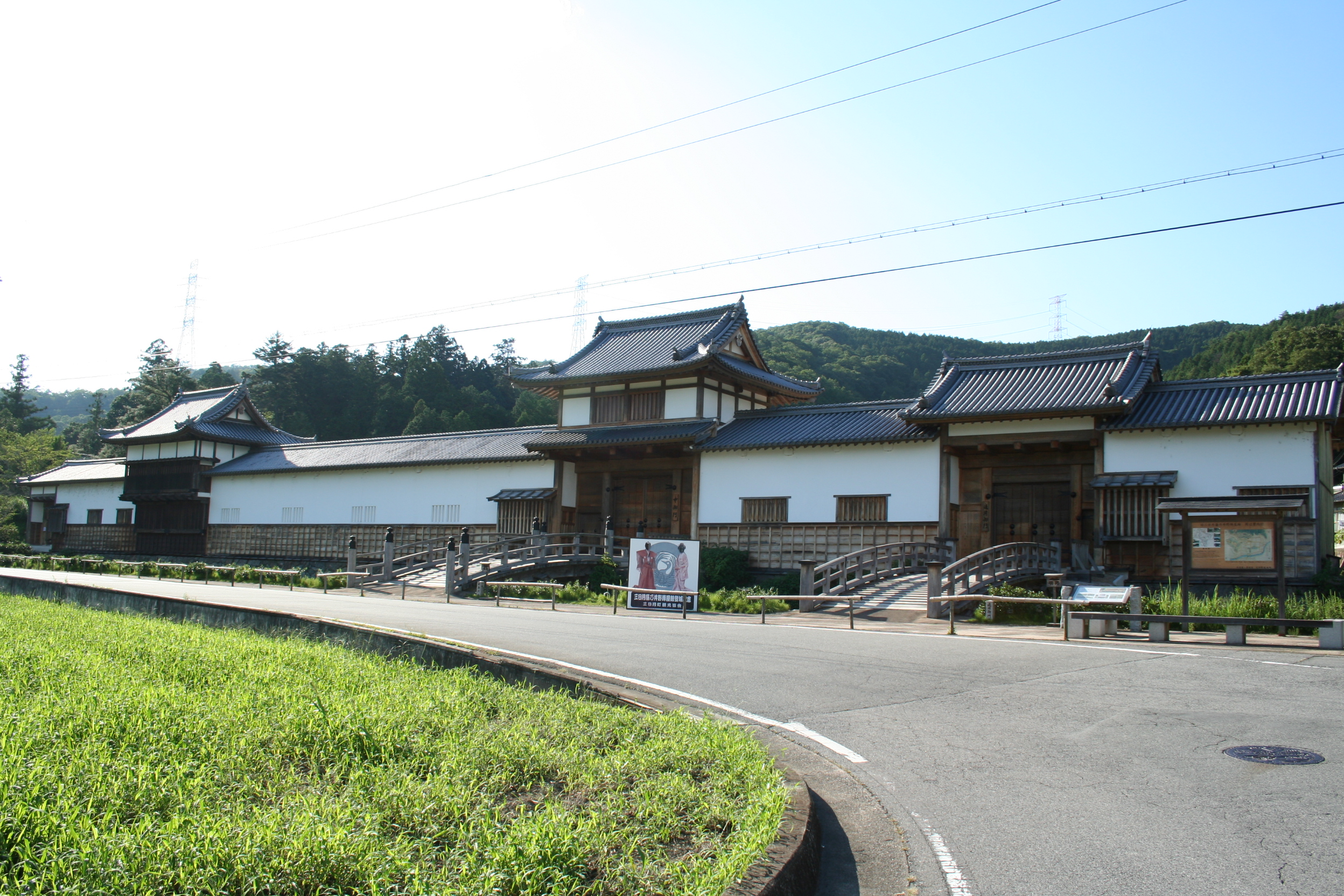 三日月陣屋。兵庫県佐用町三日月にある陣屋。 復元された三日月陣屋の建物。